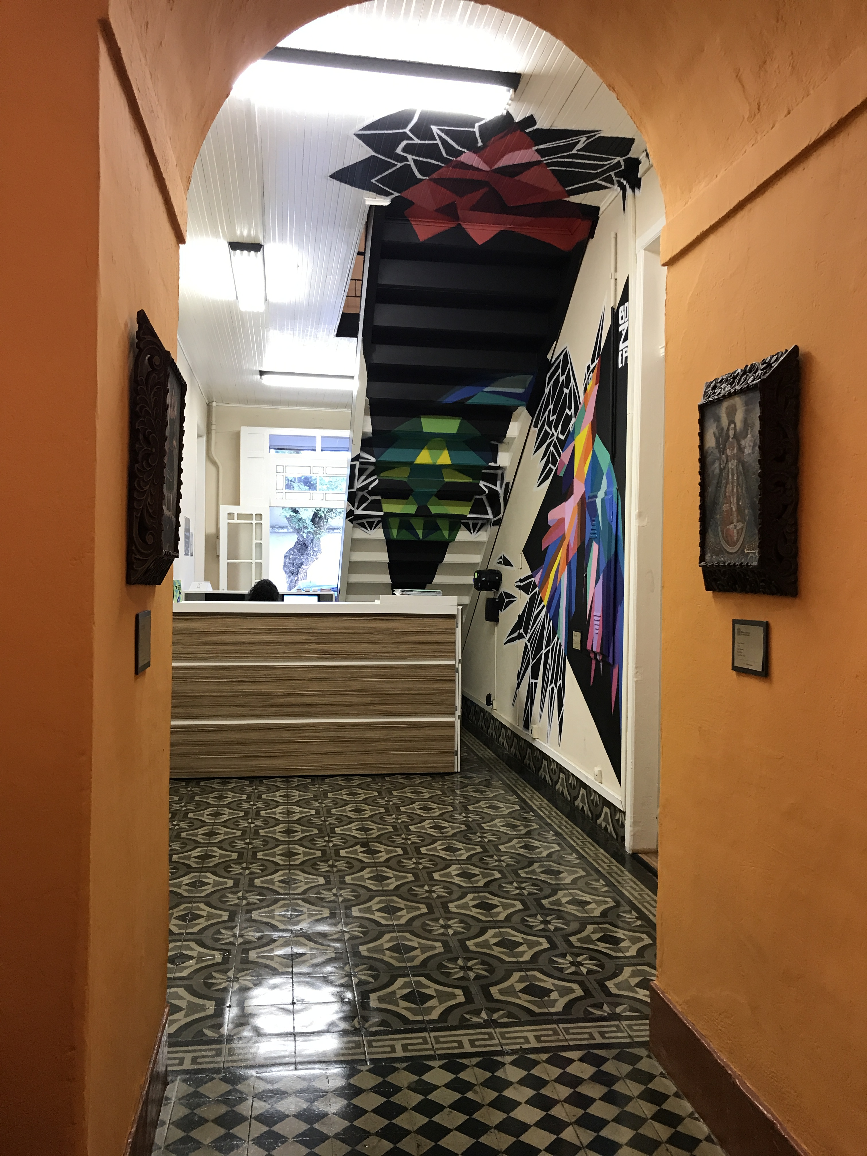 Local onde a arte Antiga e Moderna entram em contraste.